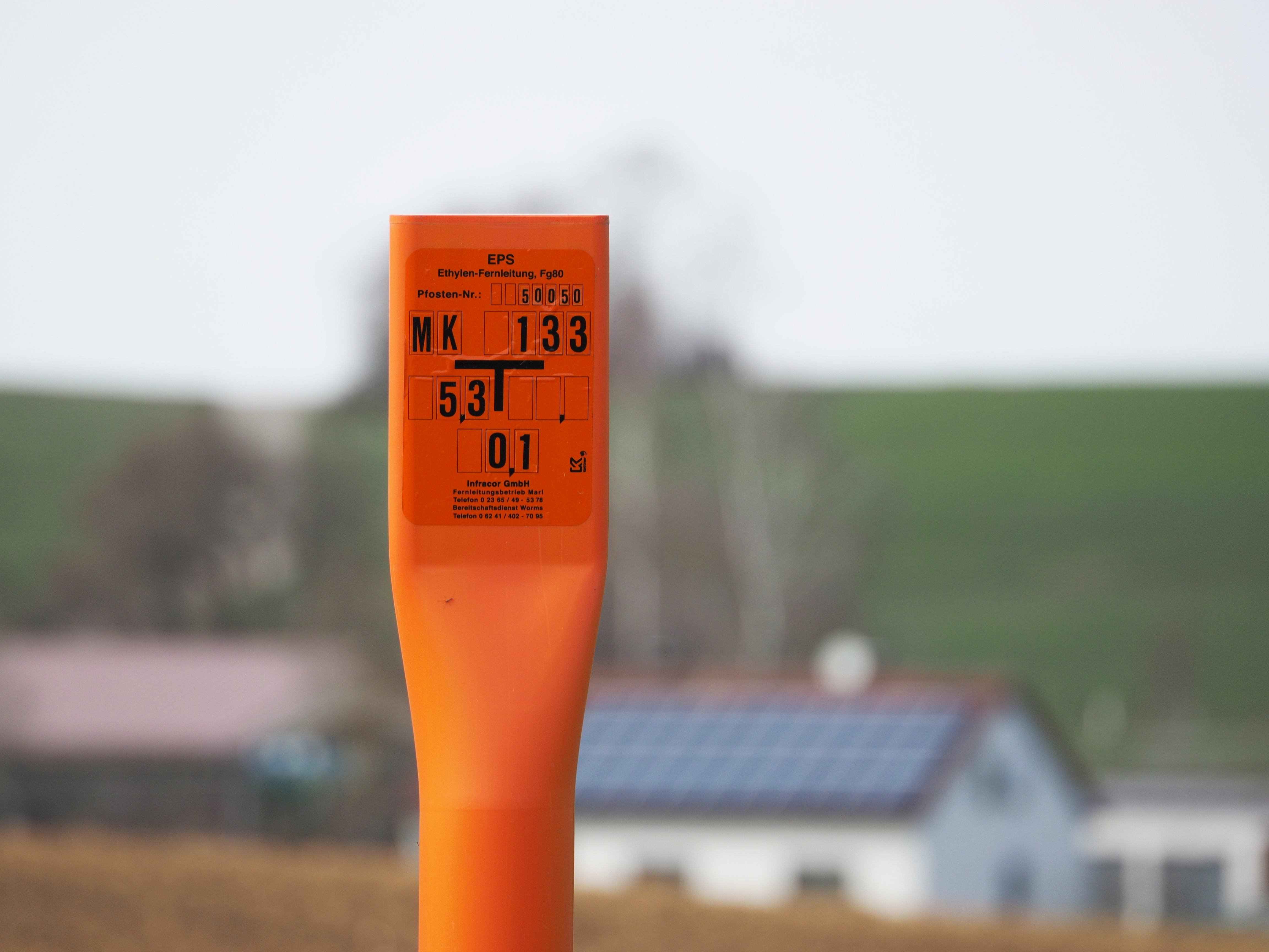 Markierungspfahl der Ethylen-Pipeline Süd bei Holzleuten